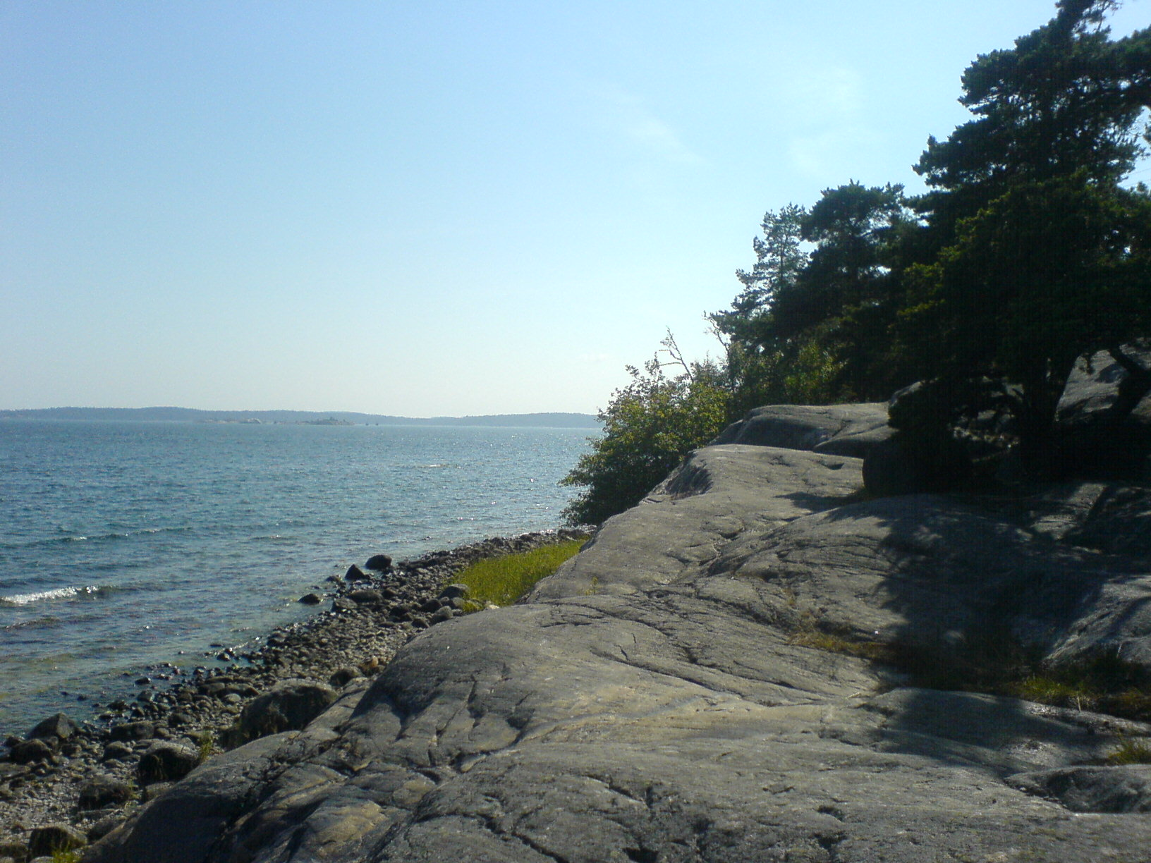 Badklippor intill Västra Bondäng på Gålö